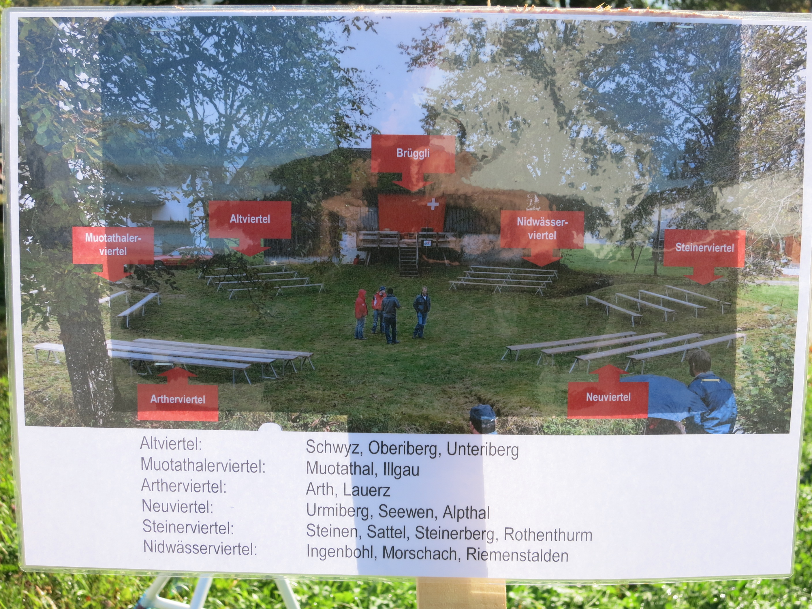 Oberallmeindkorporation Schwyz SZ, Schweiz